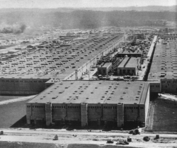 filtres de l'usine d'oakridge pour la séparation de l'uranium